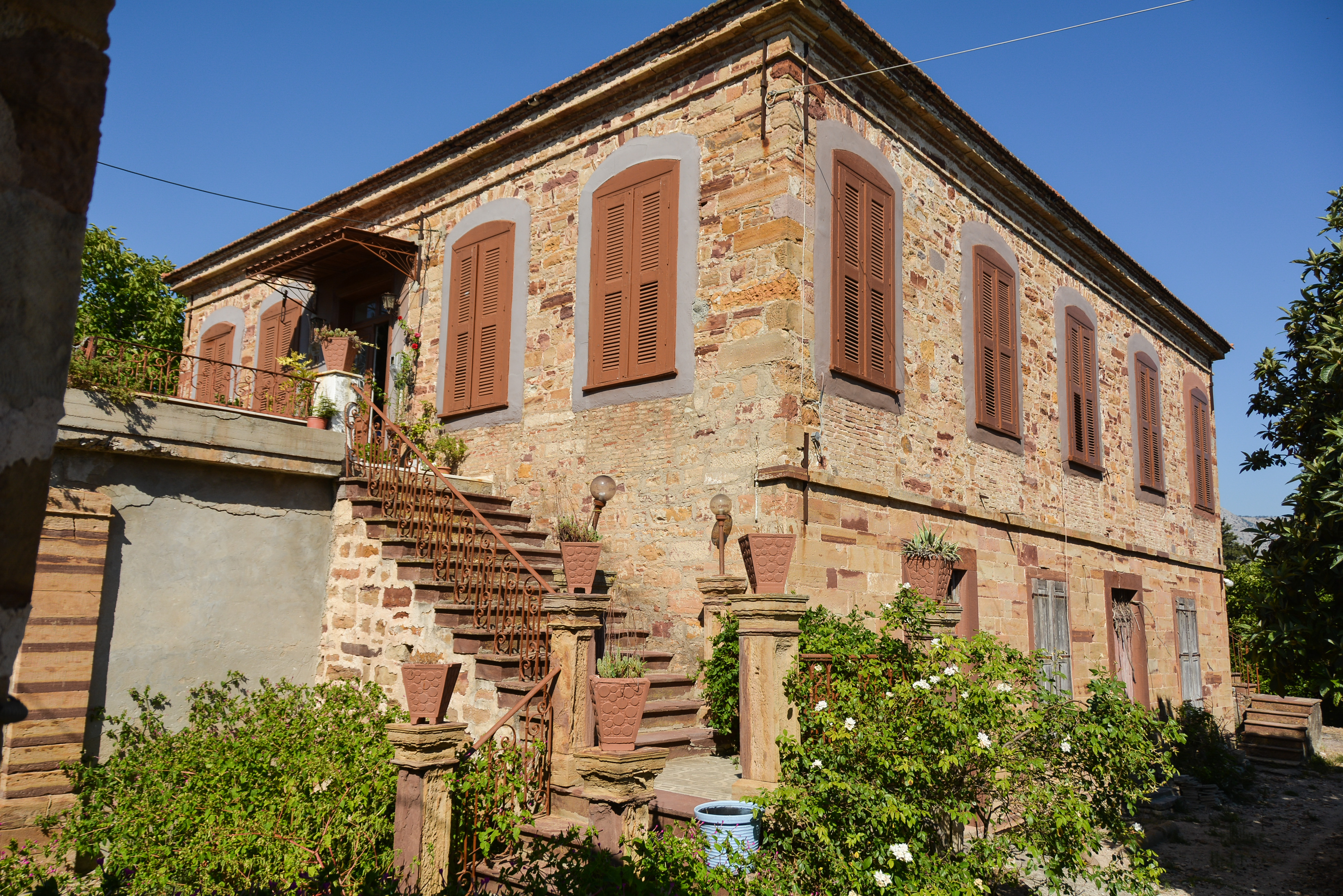 Κάμπος Χίου«Κάμπος Χίου»